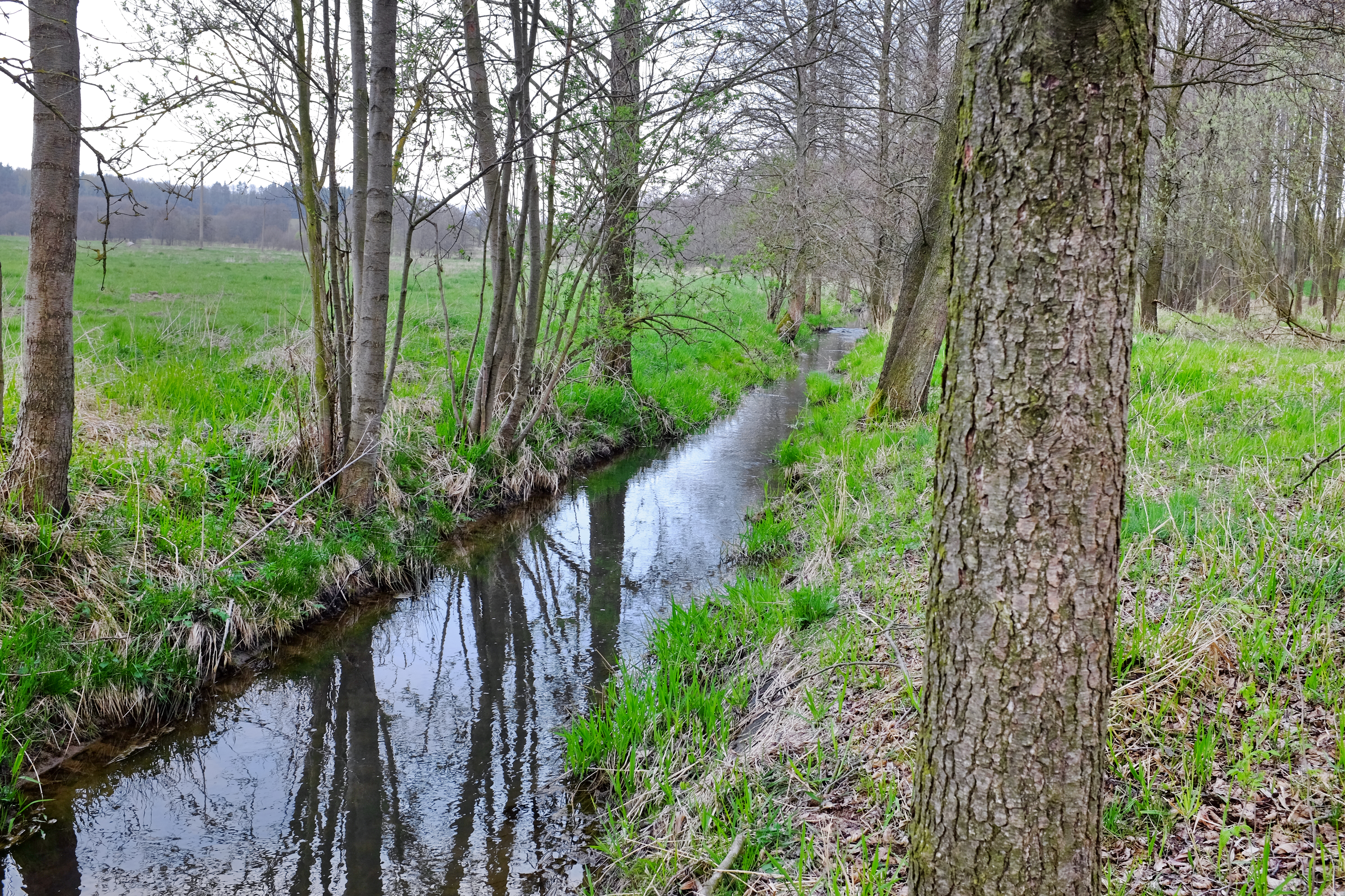 Lužní potok, přítok Sázku, v místě pod Přírodní rezervací Děvín, okres Cheb